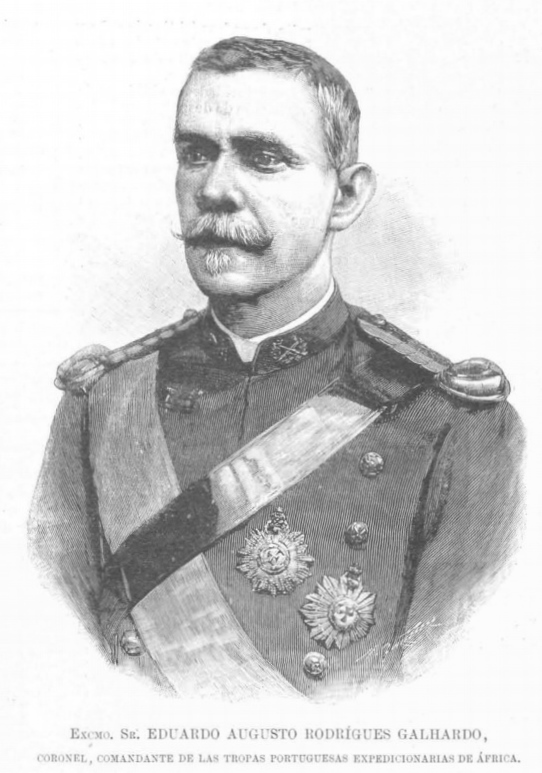 Excmo. Sr. D. Eduardo Augusto Rodrigues Galhardo, coronel, comandante de las tropas portuguesas expedicionarias de África.